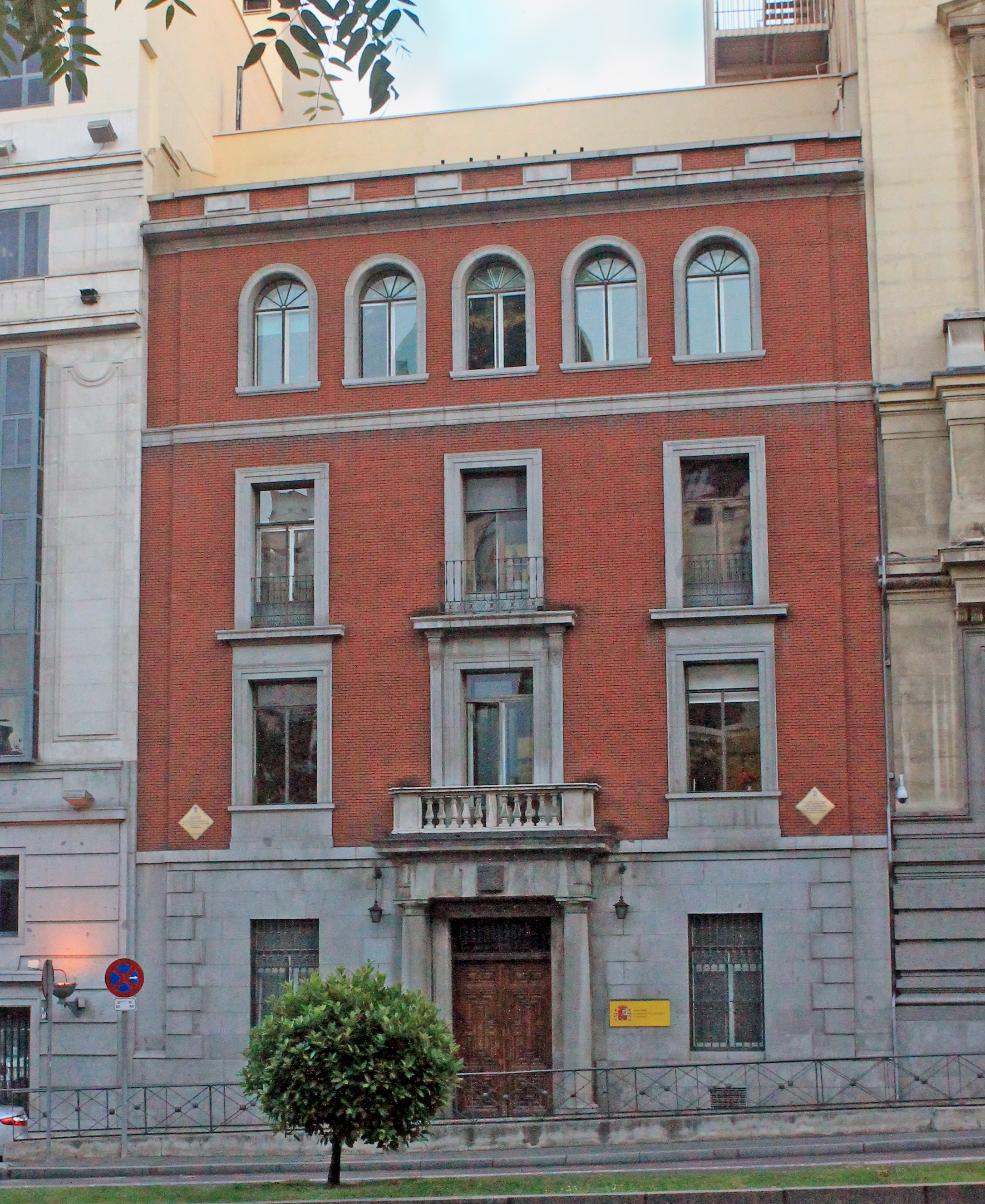 Fachada del antiguo Depósito Hidrográfico de Madrid (España), en el nº 36 de la Calle de Alcalá. Proyectado en 1802 por Manuel Martín Rodríguez y completado en 1804.